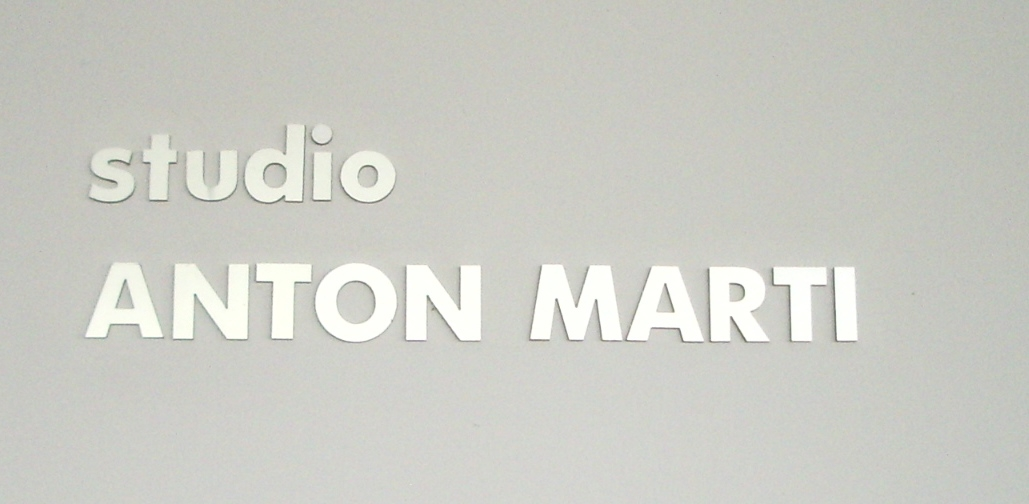 Hrvatska radiotelevizija, Zagreb